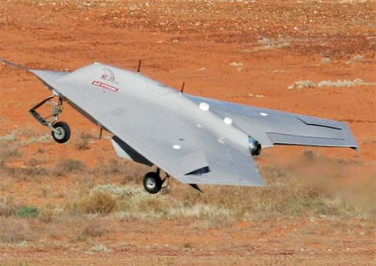 BAE Taranis